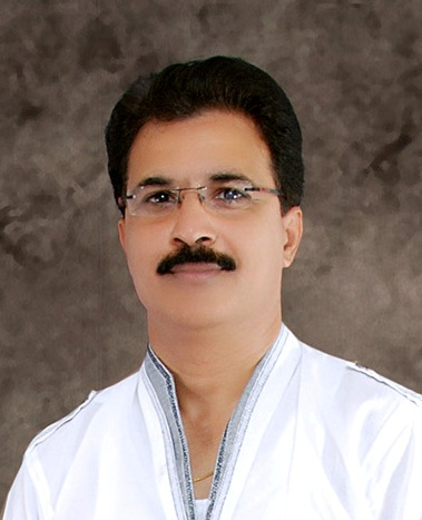 శ్రీనివాస్ రామడుగుల